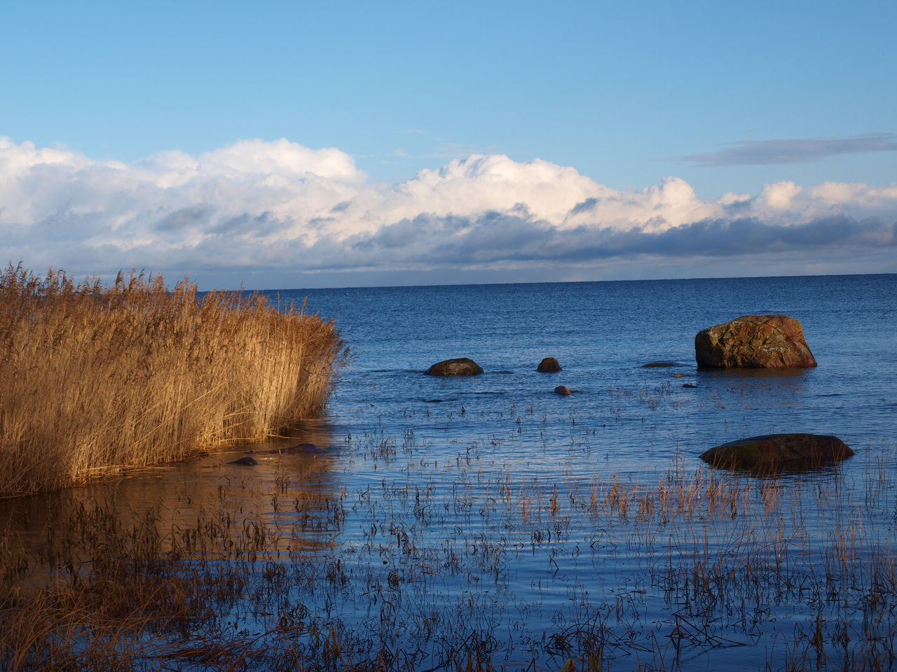 läheneva sügise eel, Eisma küla